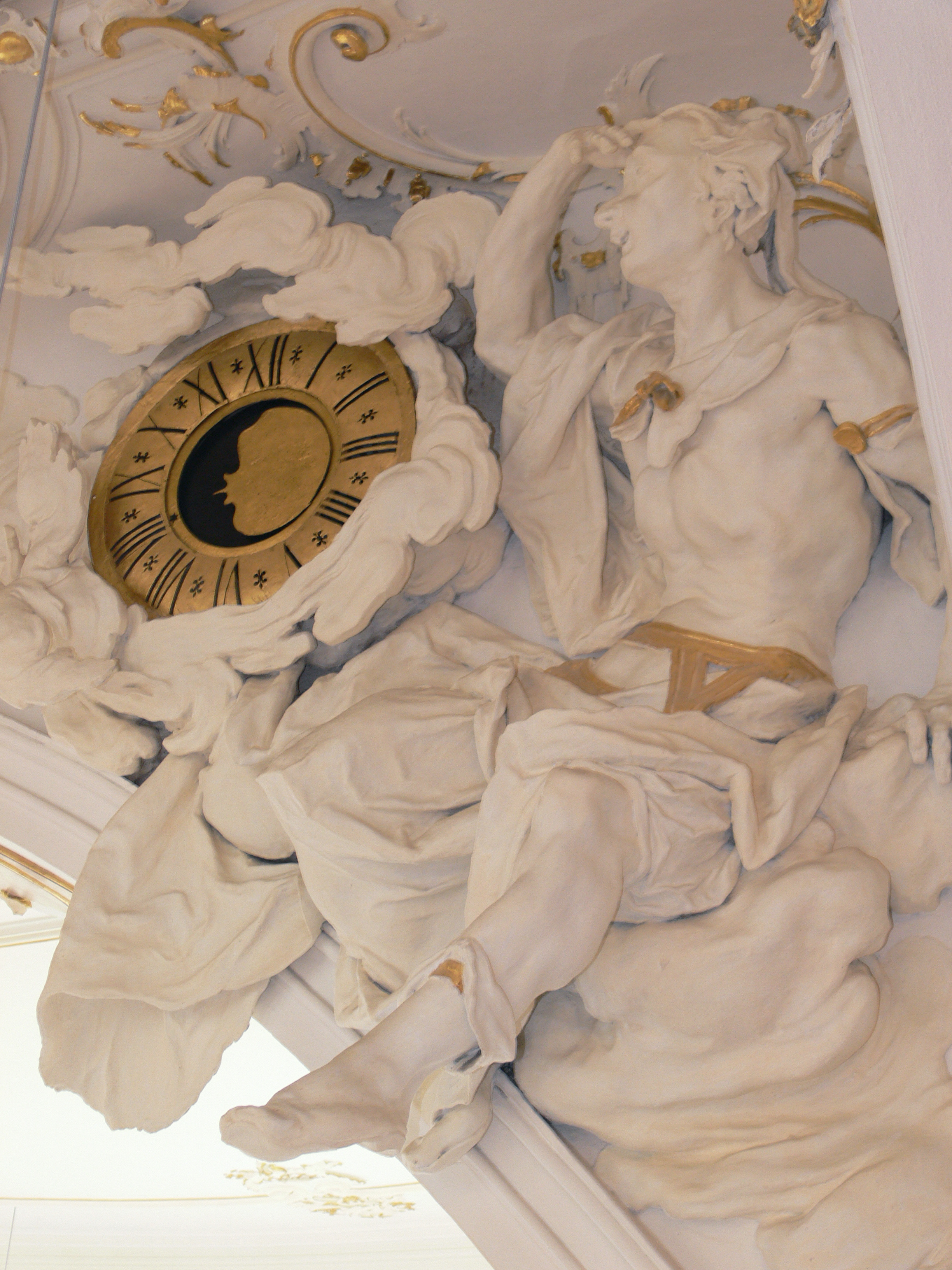 Schlosskirche (ehem. Schlosskapelle), Neues Schloss,Tettnang Johann Kaspar Gigl: Mond-Uhr Johann Kaspar Gigl (1737–1783) Alternative namesGigl, Johann CasparDate of birth/death1737-07-18 (baptism)after 1783Location of birthWessobrunn